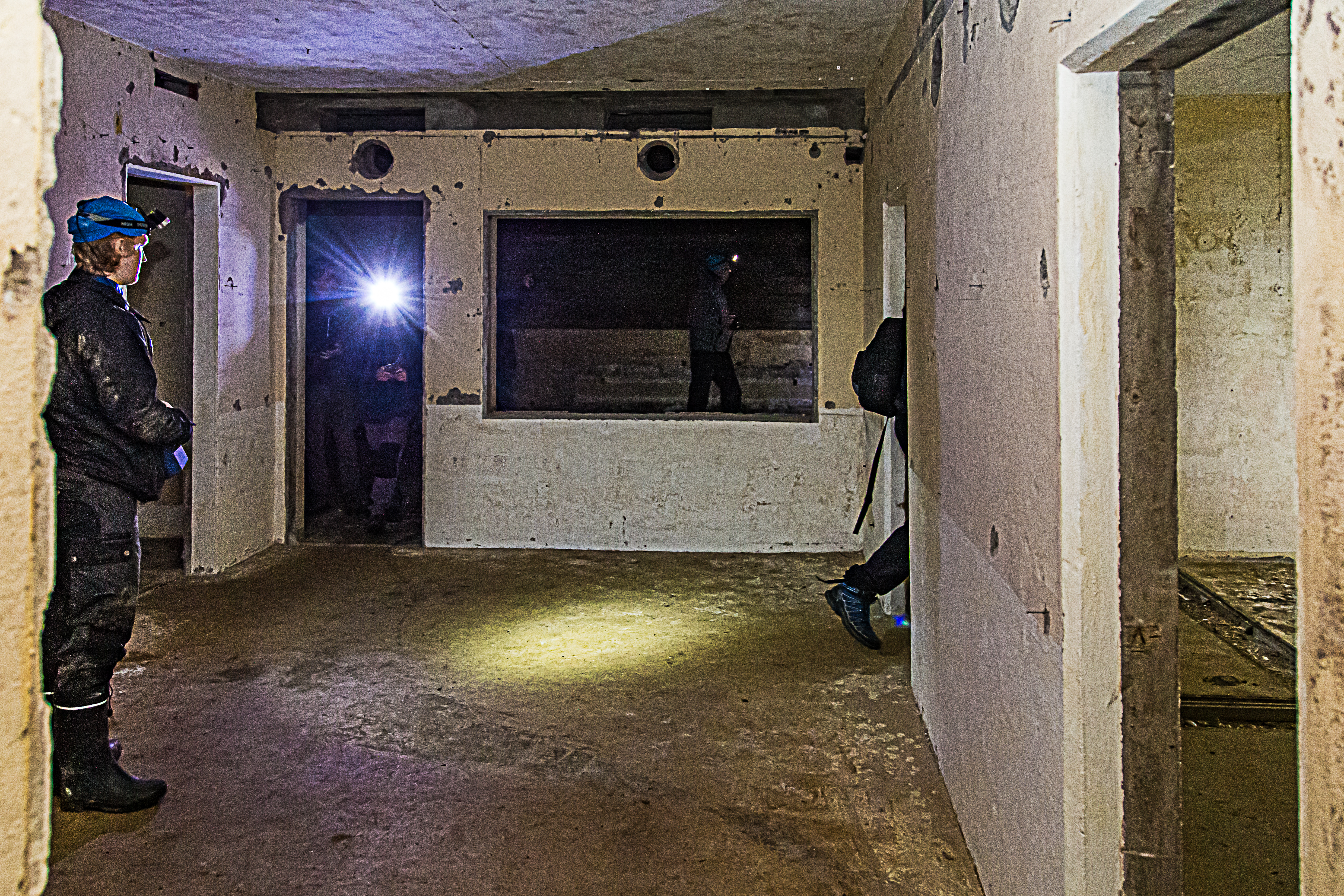 Luftförsvarsgruppcentral (LGC) Krickan, Stadsberget, Hedemora, Dalarnas län, Sverige. Plomberingen bröts för en dag så att man kunde gå ner och titta, därefter återplomberades den.